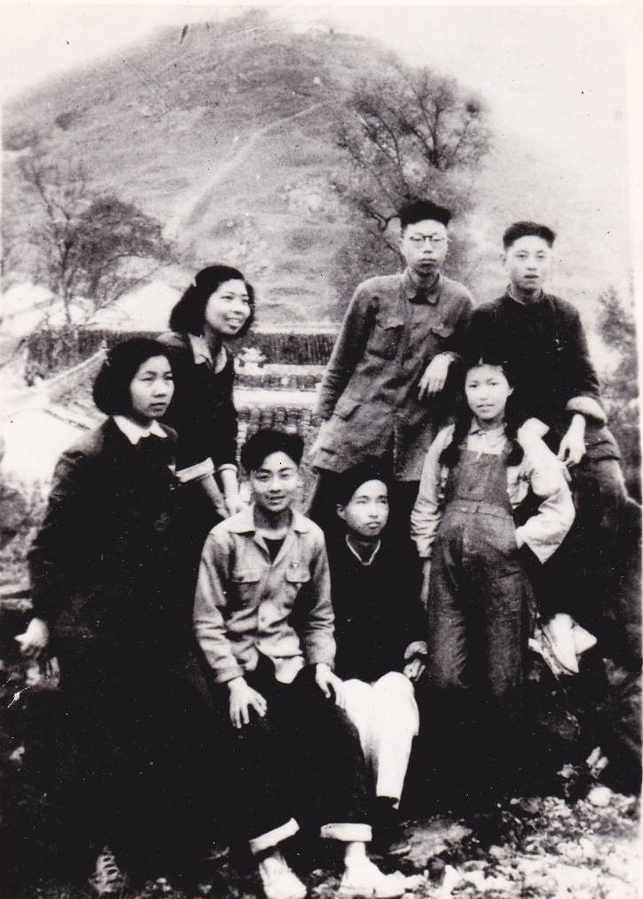 林昭（前排右一）与苏南新专同学合影，摄于惠山石门